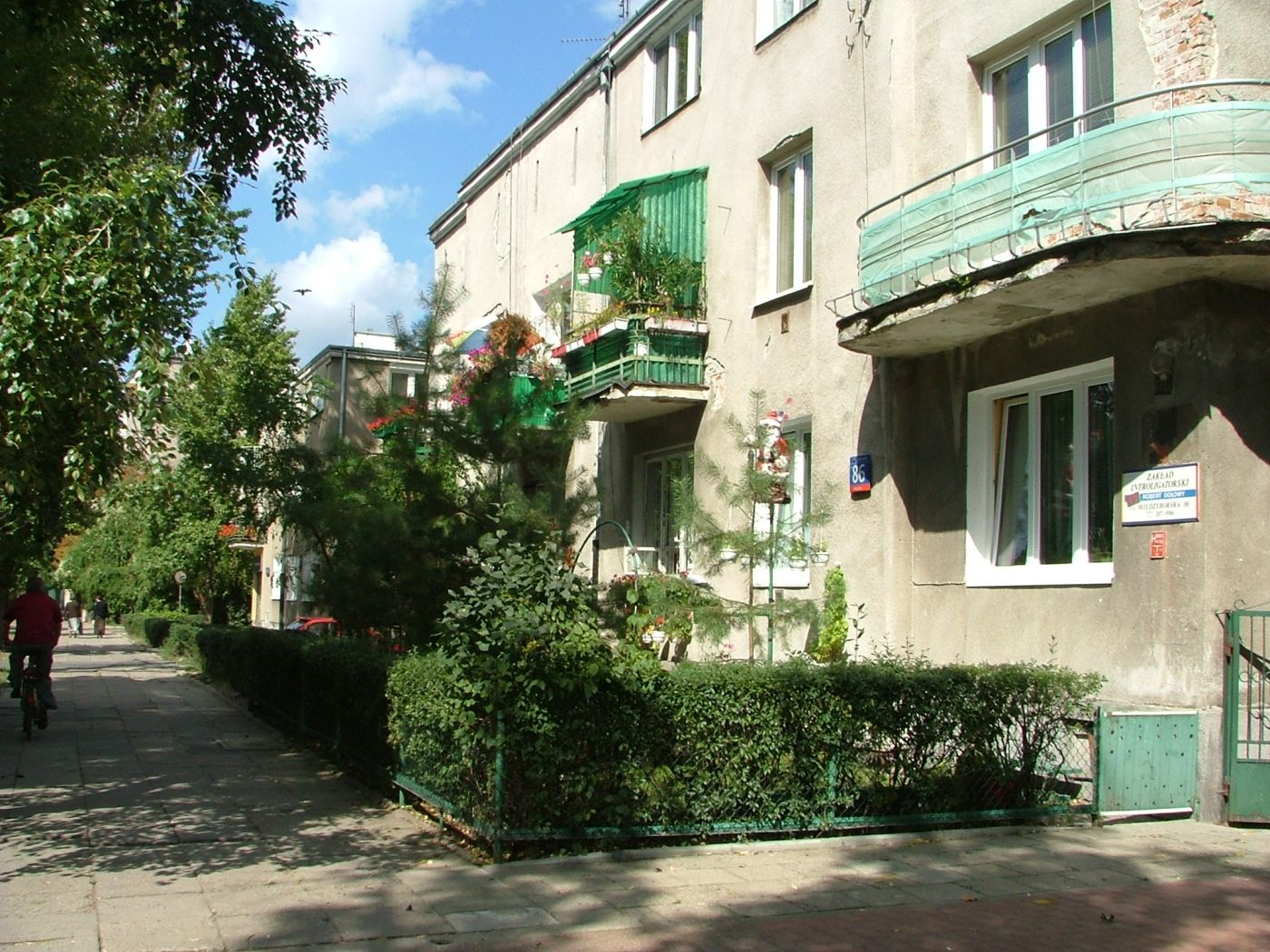 pl, Warsaw, Poland, Praga Południe, Grochów, ulica Międzyborska